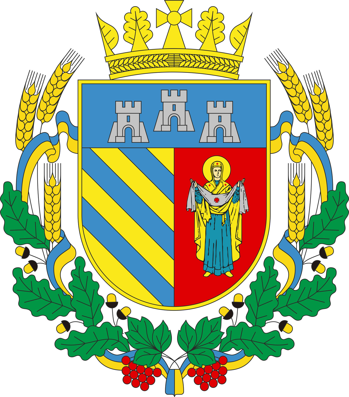 герб Чортківського району